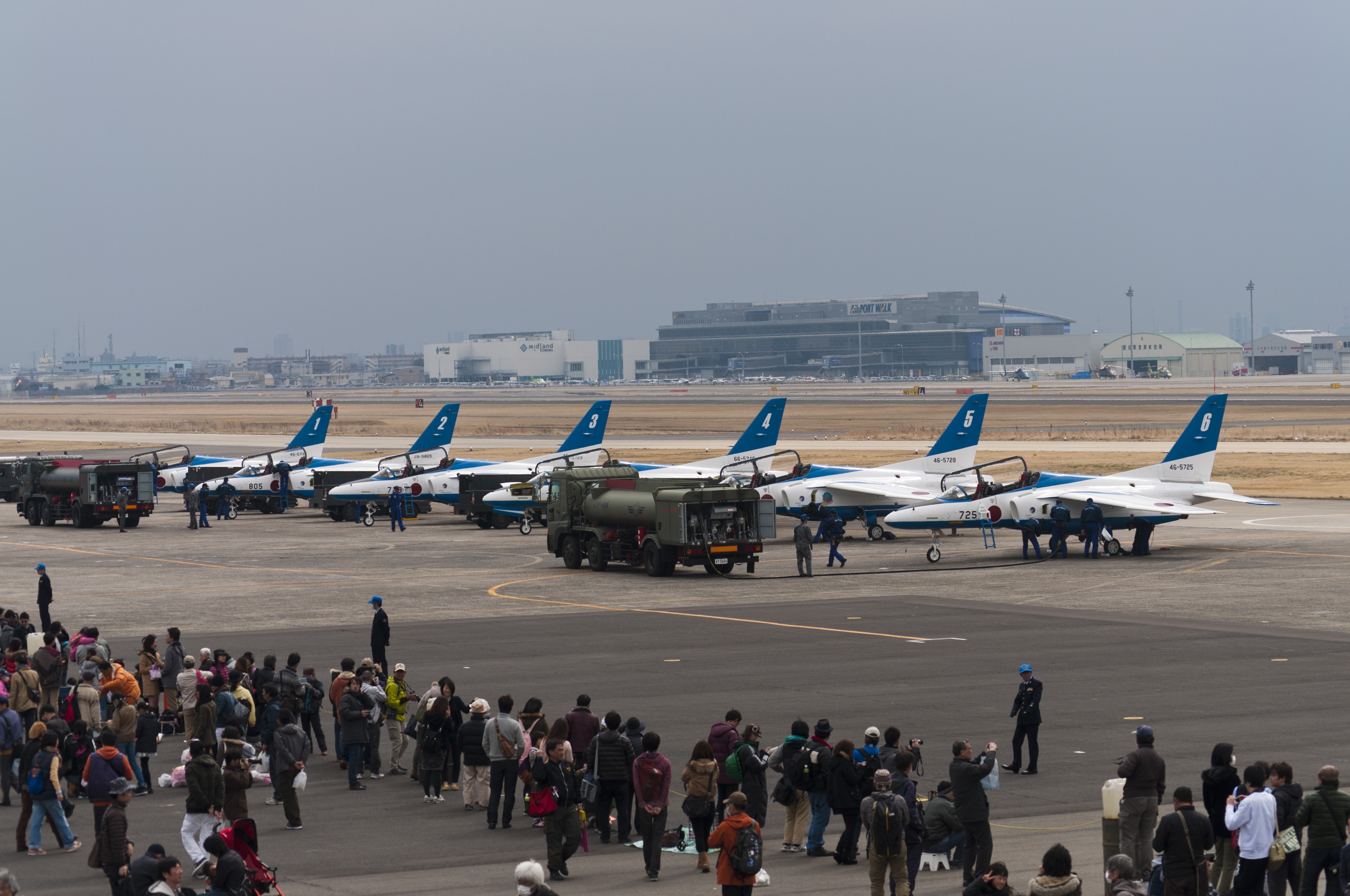 駐機するブルーインパルスのT-4。2015年小牧基地オープンベースにて。